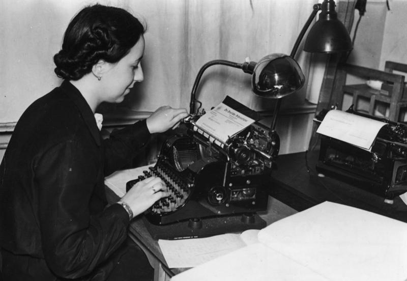 Sekretärin an Schreibmaschine Scherl Bilderdienst Künstlerträume nach Feierabend. Tagsüber bedienen die geschickten Mädchenhände im Büro die Schreibmaschine. [Sekretärin an Schreibmaschine im Büro; Text auf dem Briefkopf "Die Deutsche Arbeitsfront"]